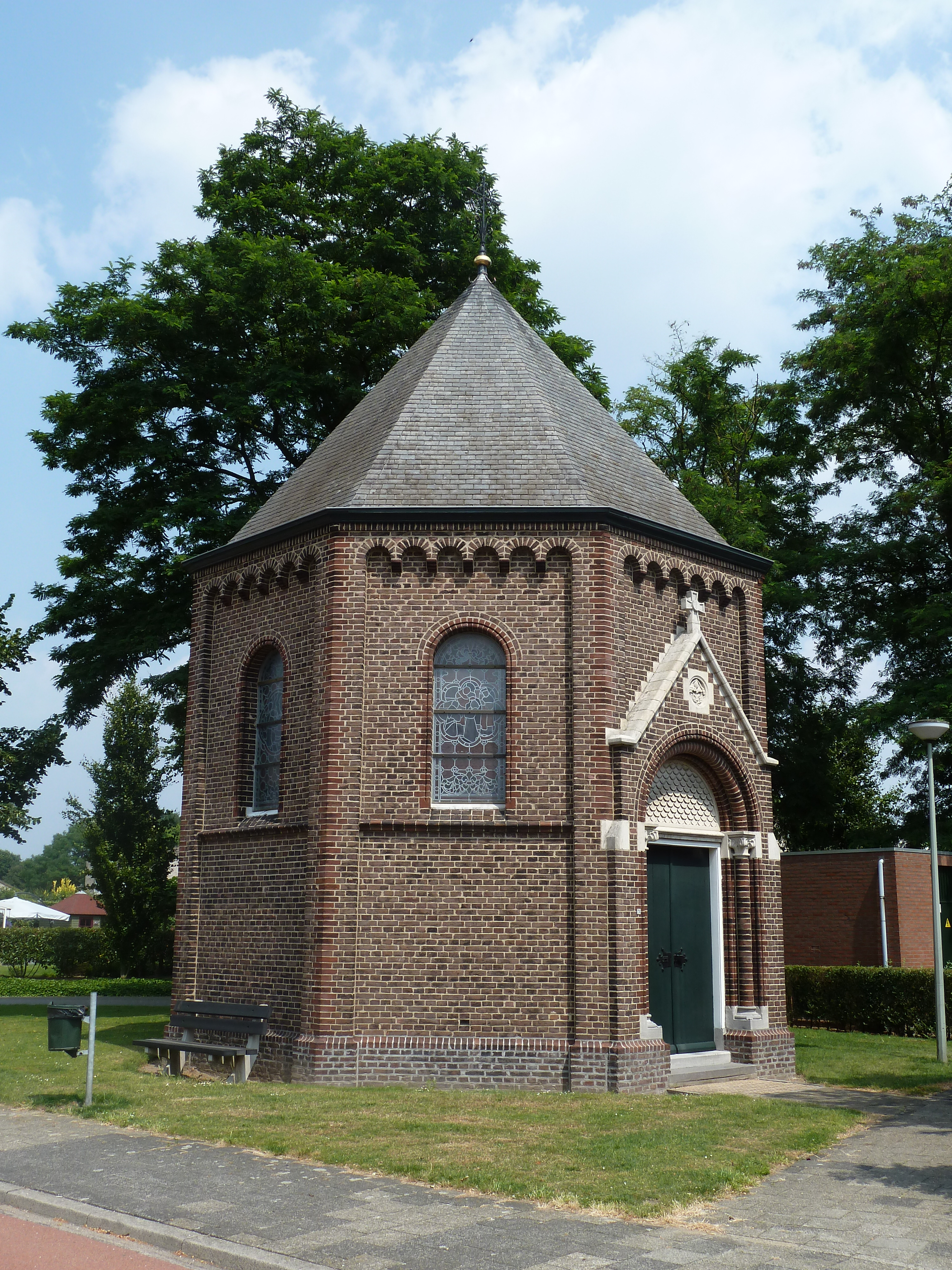 Sint-Antoniuskapel aan de Sint Antoniusstraat 28, Heythuysen, Nederland